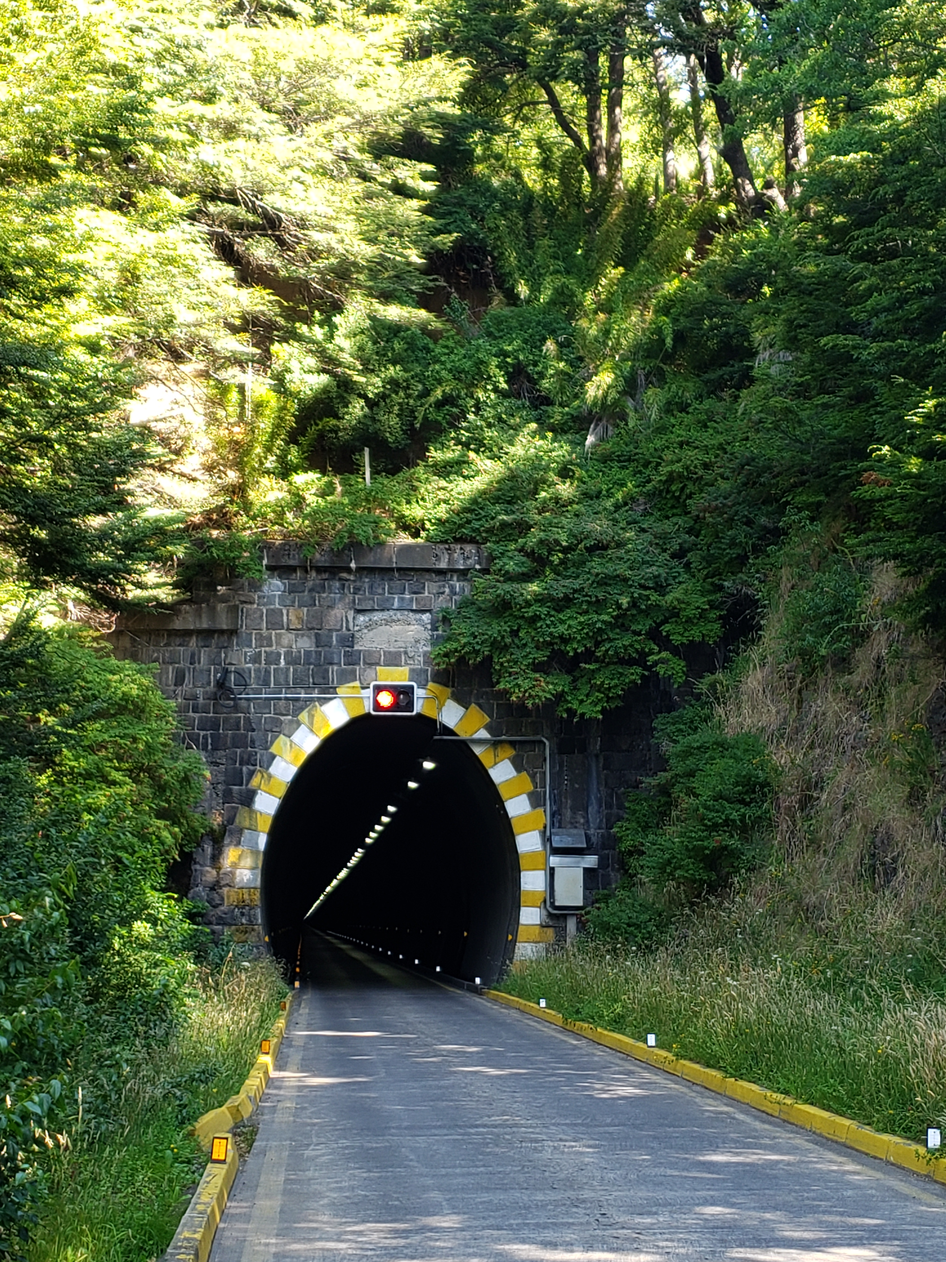 Entrada poniente del Túnel Las Raíces, Chile